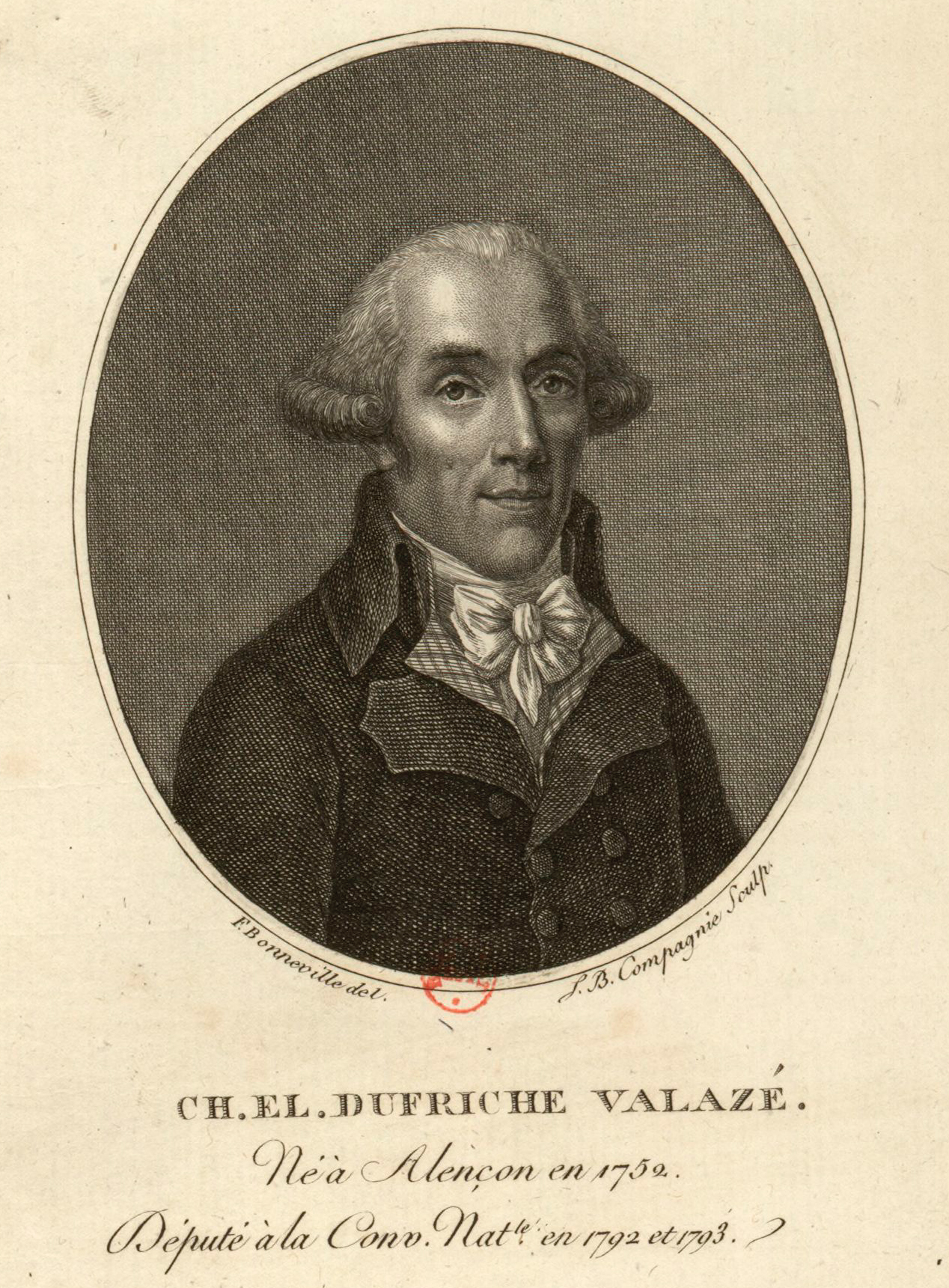 Ch. El. Dufriche Valazé : né à Alençon en 1752, député à la Conv. nat. le en 1792 et 1793, estampe.